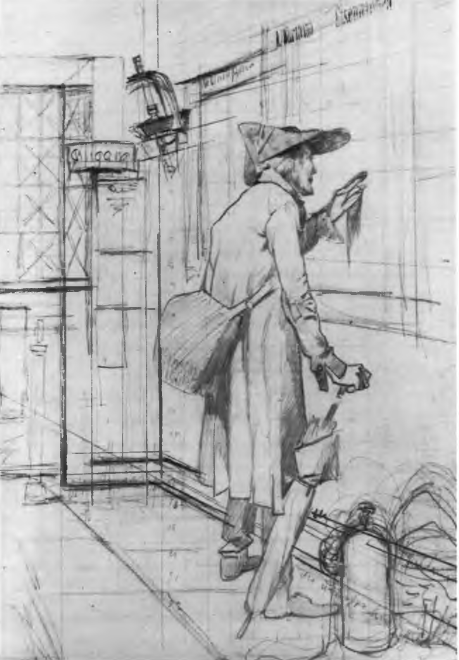 Bauer im Wartesaal, Bleistiftskizze, 47 x 32 cm